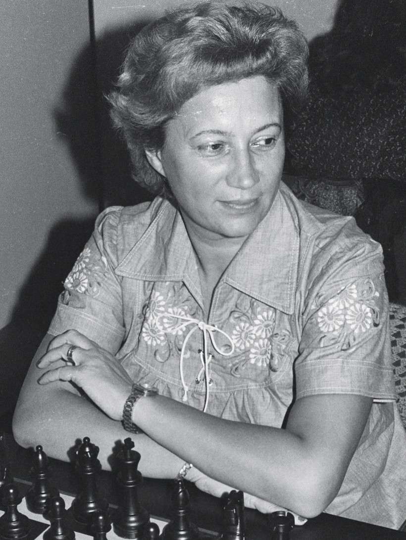 Elisabeta Polihroniade, während des Interzonenturnieres 1979 in Rio de Janeiro.